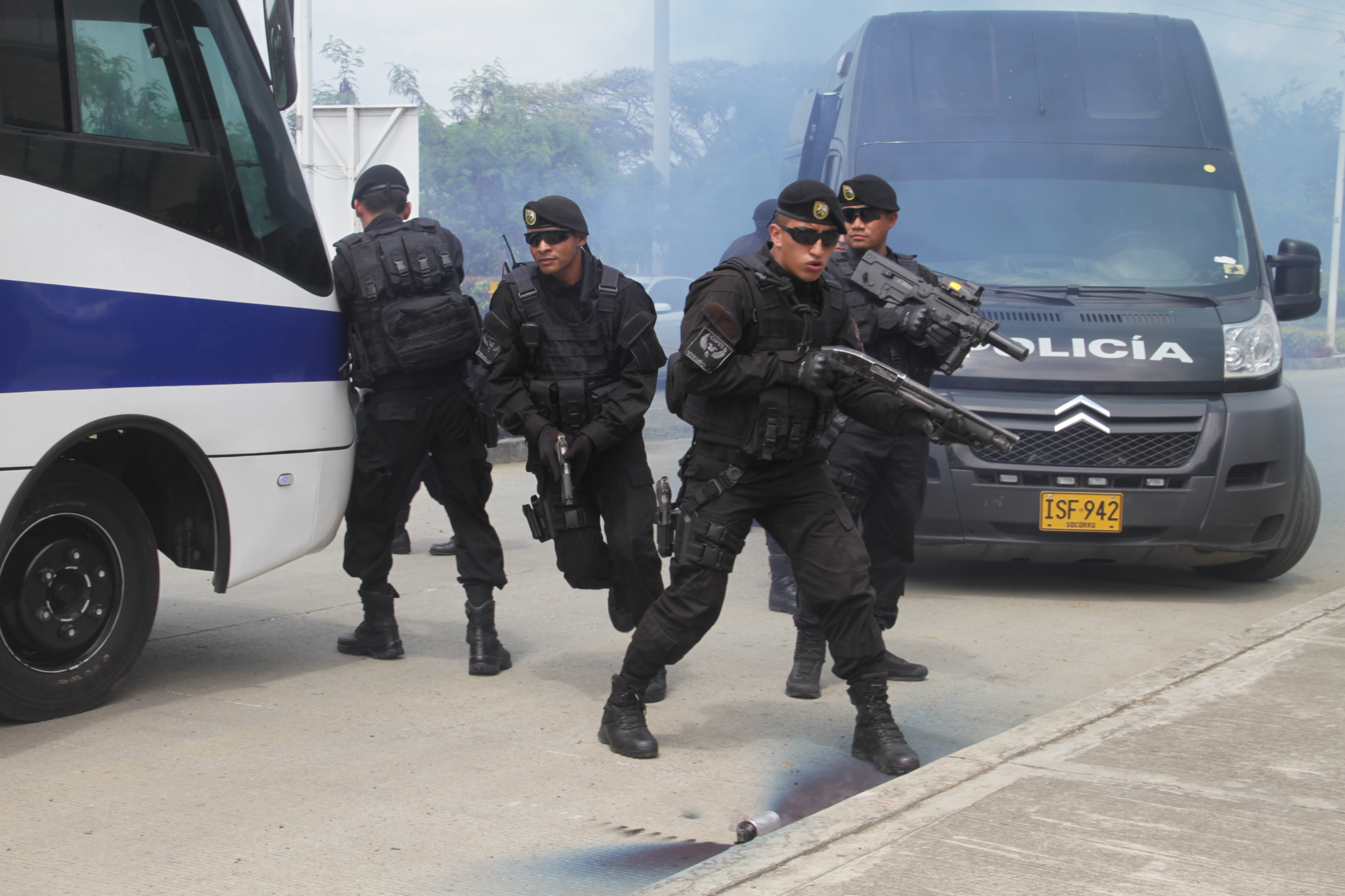 Dispositivo de seguridad para la 3a Cumbre Mundial de Alcaldes y Mandatarios Afrodescendientes Cali y Cartagena